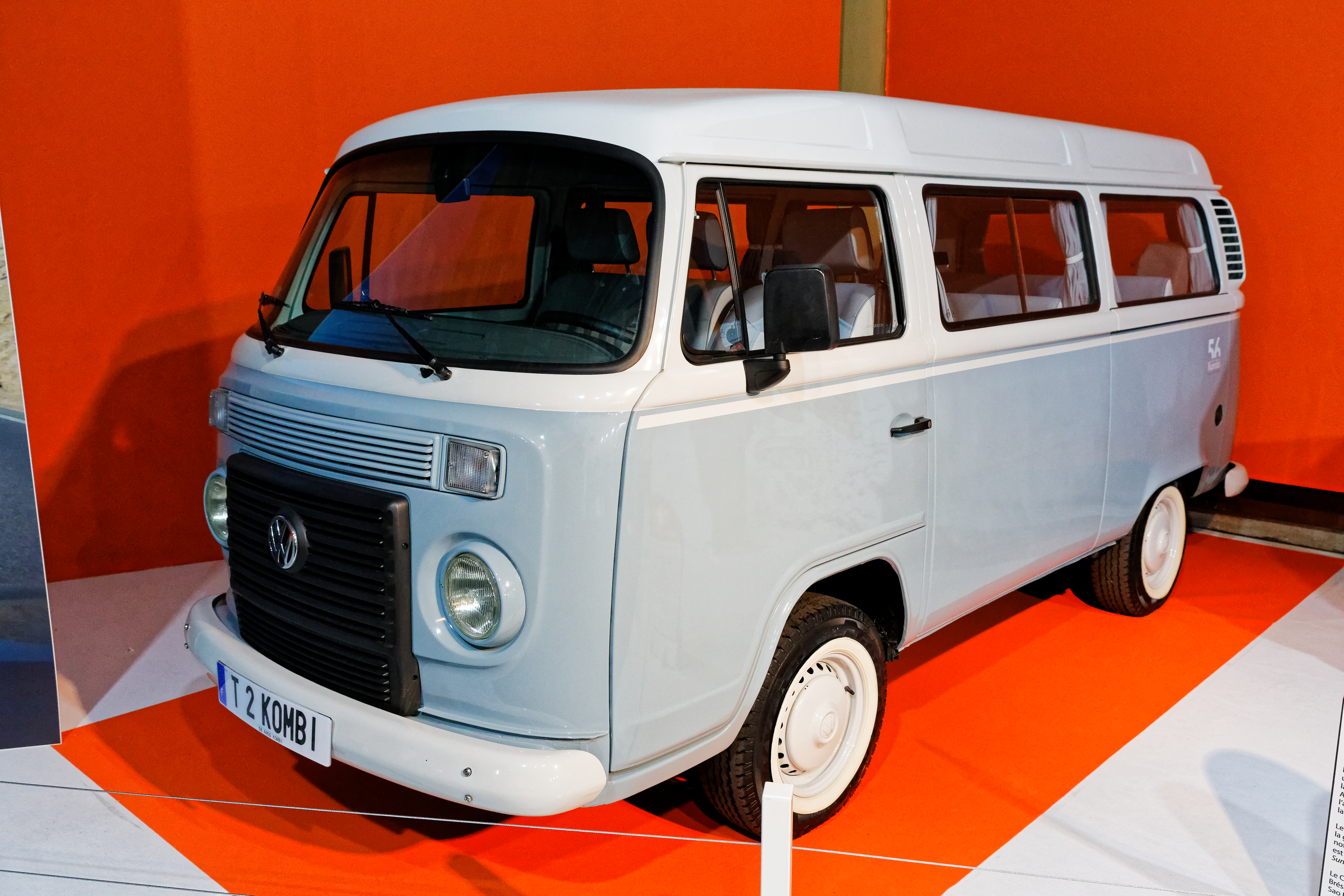 Une Volkswagen Combi T2 exposée lors du mondial de l'automobile de Paris 2018.